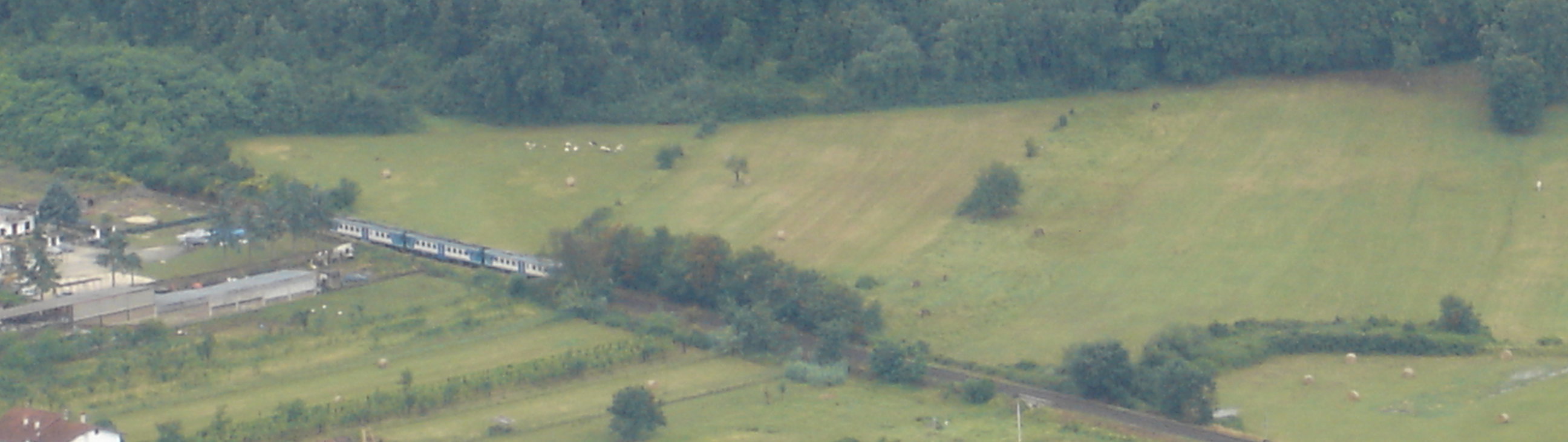 Ferrovia del Liri, presso Arce.